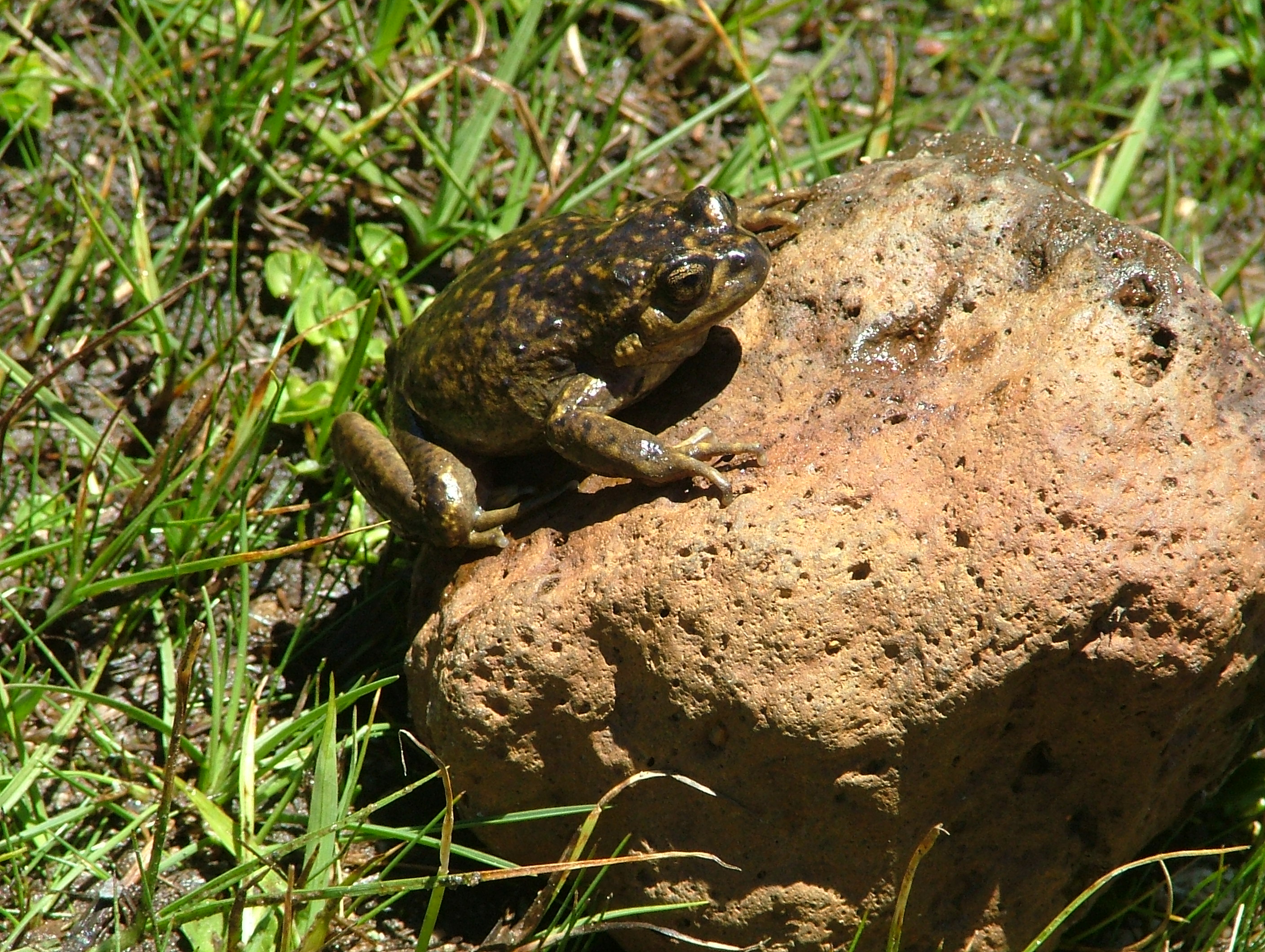 Ejemplar hembra de Alsodes pehuenche